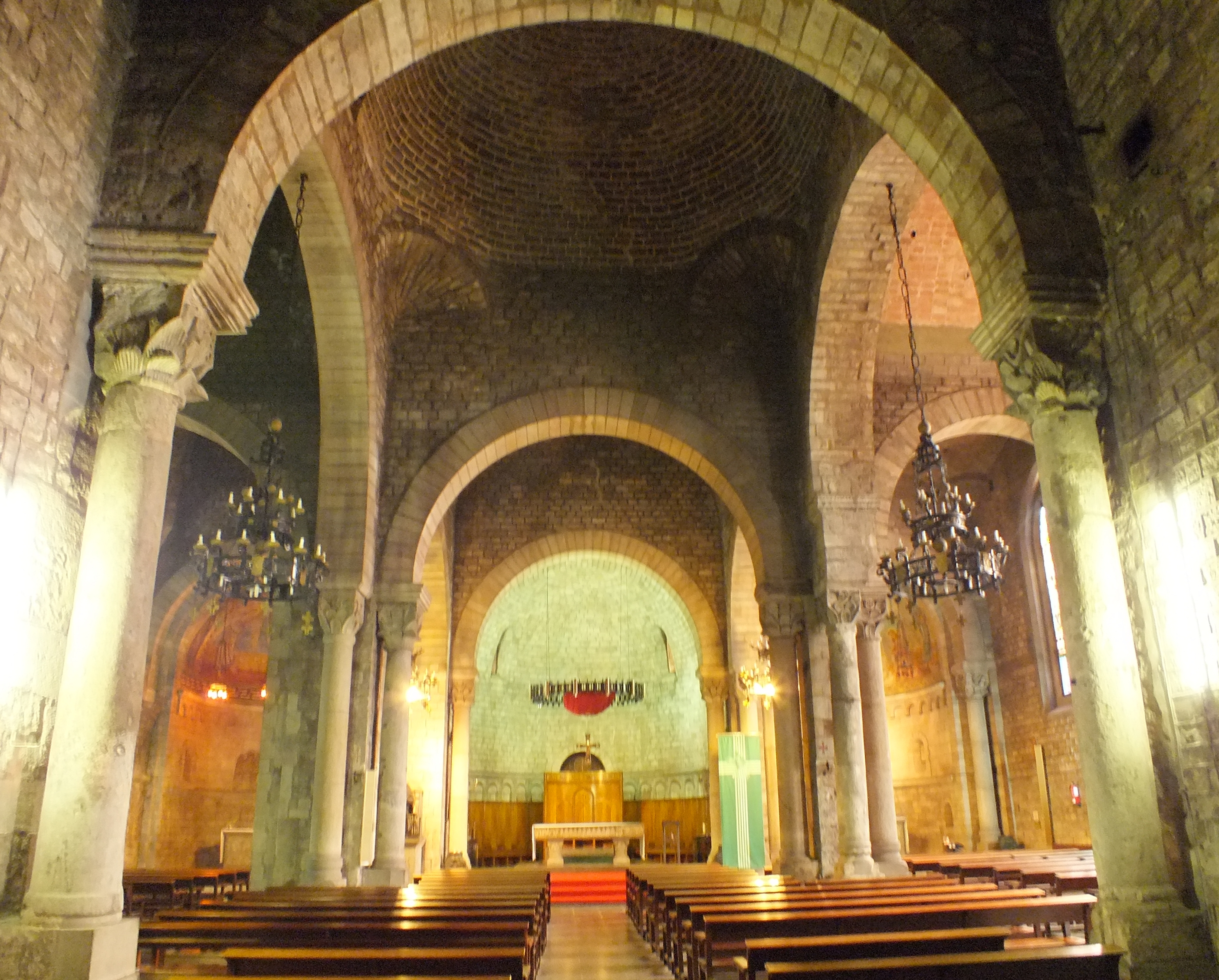 Esta foto participa en el juego En otro lugar de Flickr. Si no perteneces al grupo, no contestes, por favor. Si quieres contestar, únete